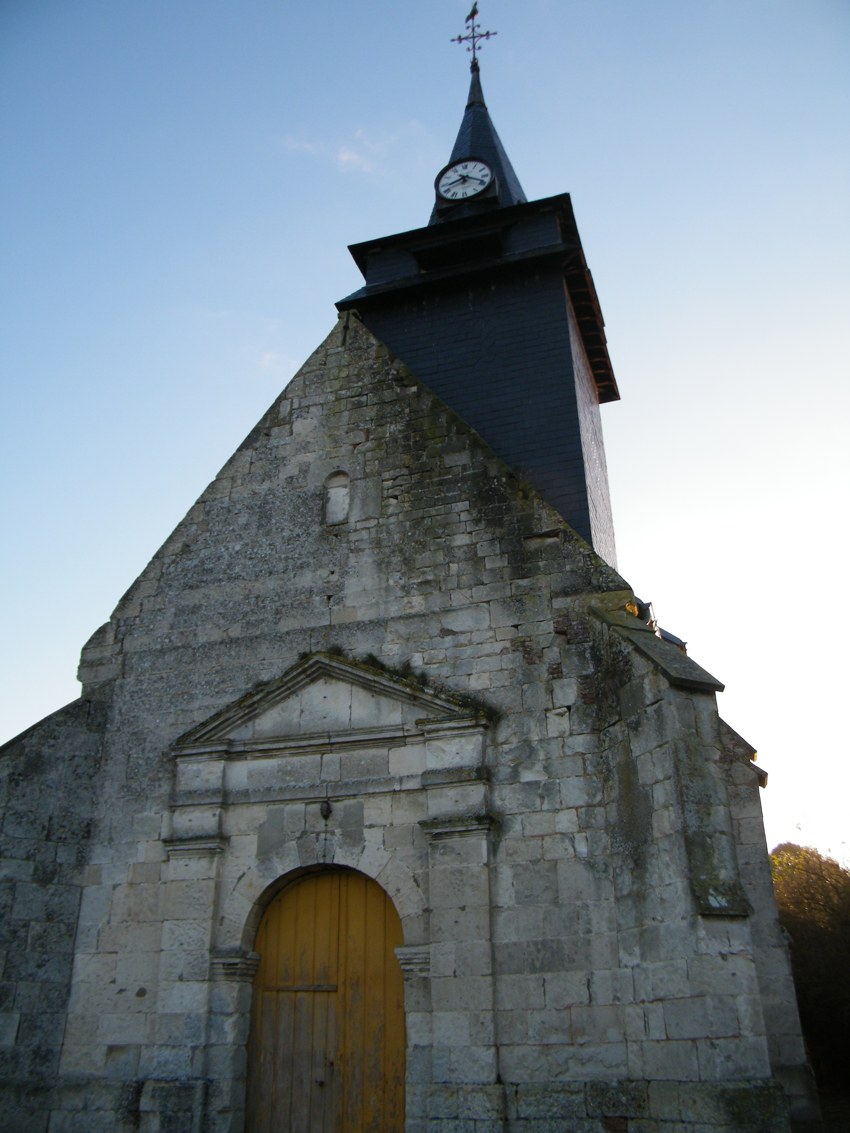 L'église.